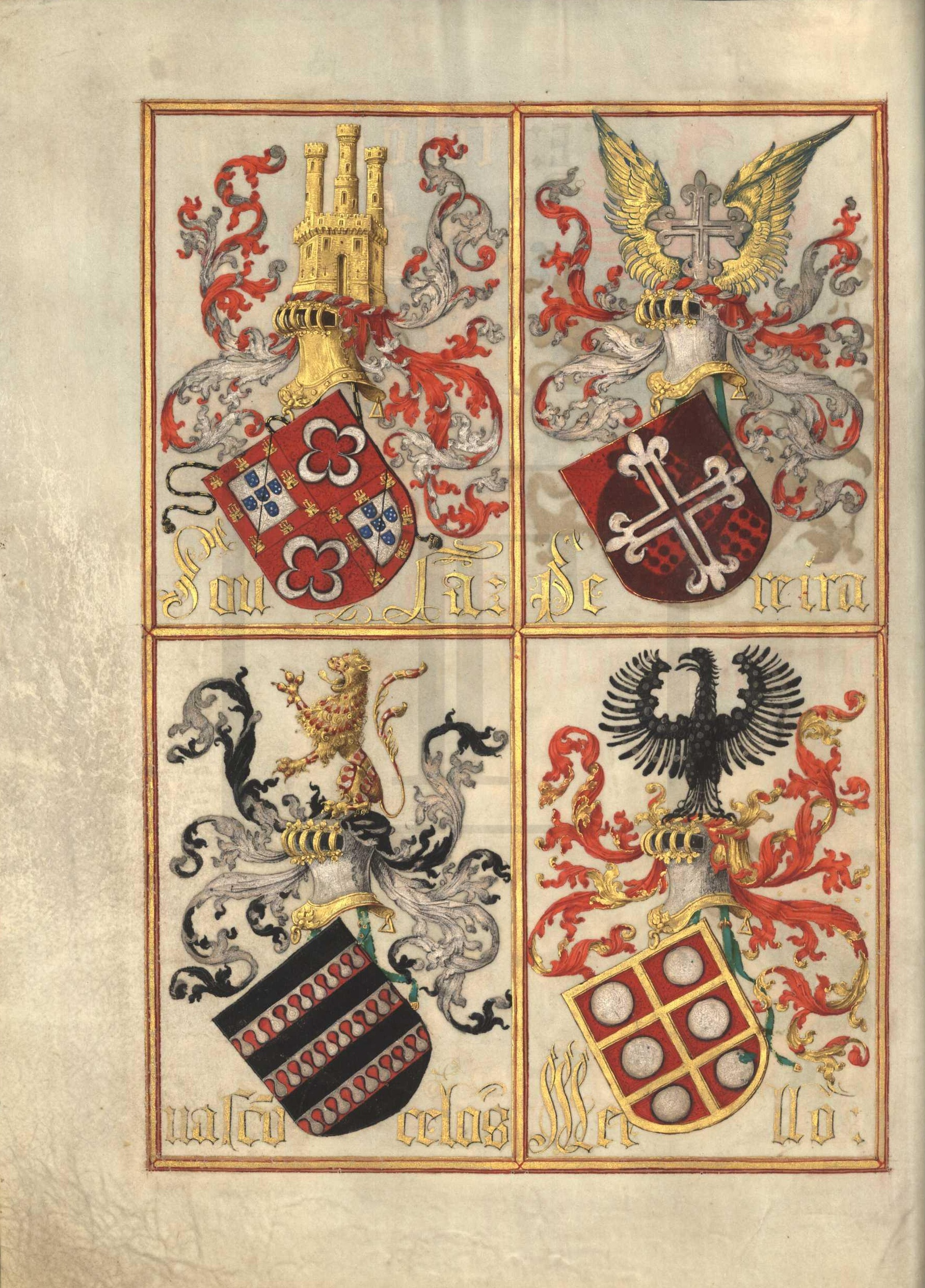 Livro da Nobreza e Perfeiçam das Armas (fl 10v)